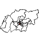 mapa del distrito de socabaya, Arequipa